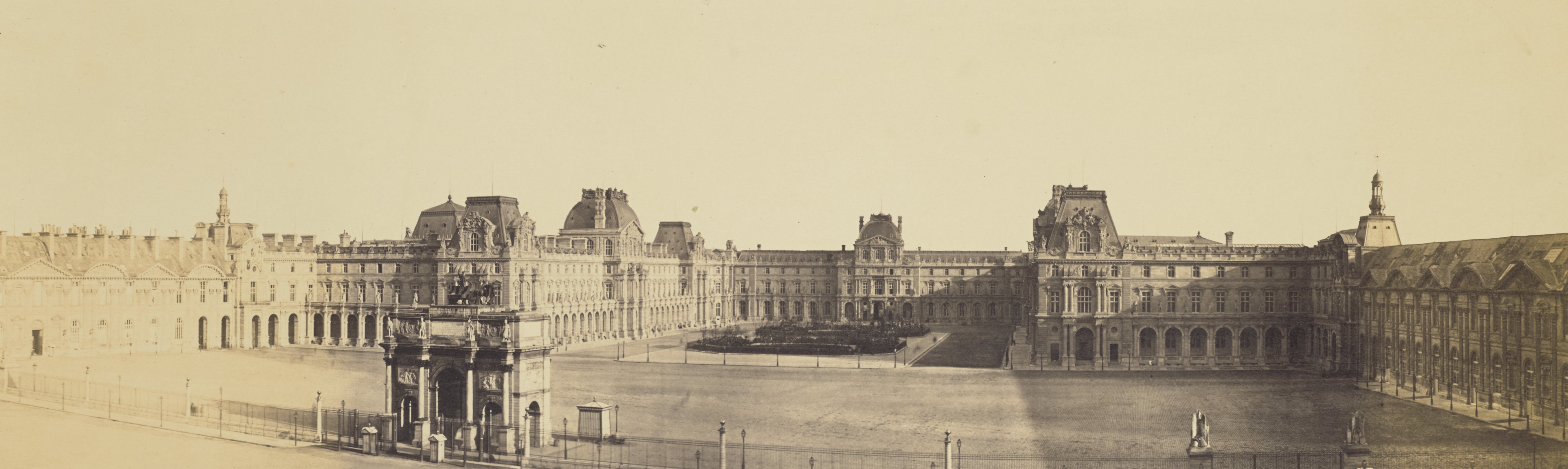 Photographic print from Reunion des Tuileries au Louvre. 1852 - 1857. Recueil de Photographies publie par order...Achille Fould...[Vol. 1]